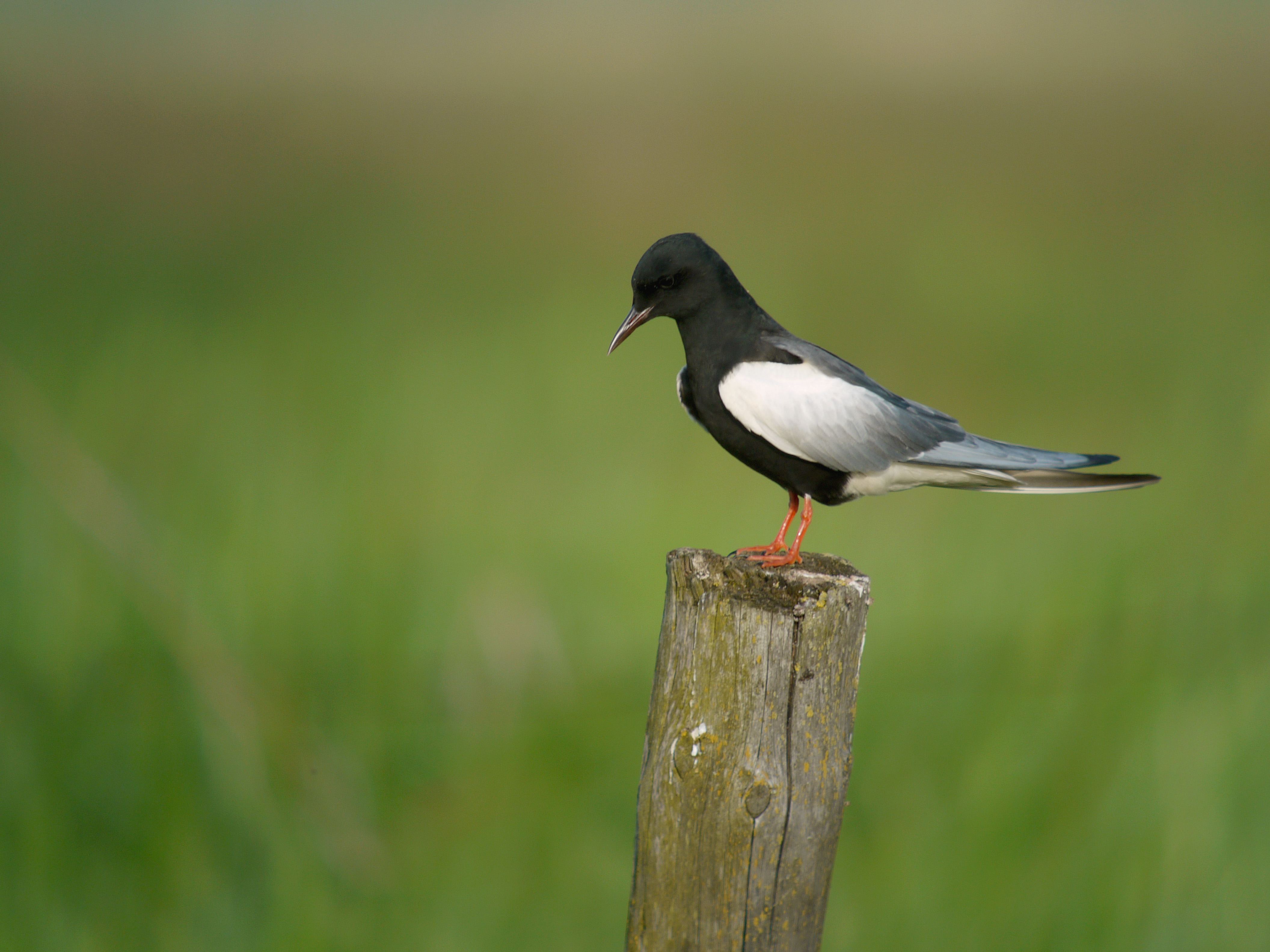 Chlidonias leucopterus, Mścichy, Biebrzański Park Narodowy, Polska. Swarowski 80 HD 30 X, Panasonic DMC-GF1 + Lumix G 20mm F1.7 ASPH (Adapter DCB)